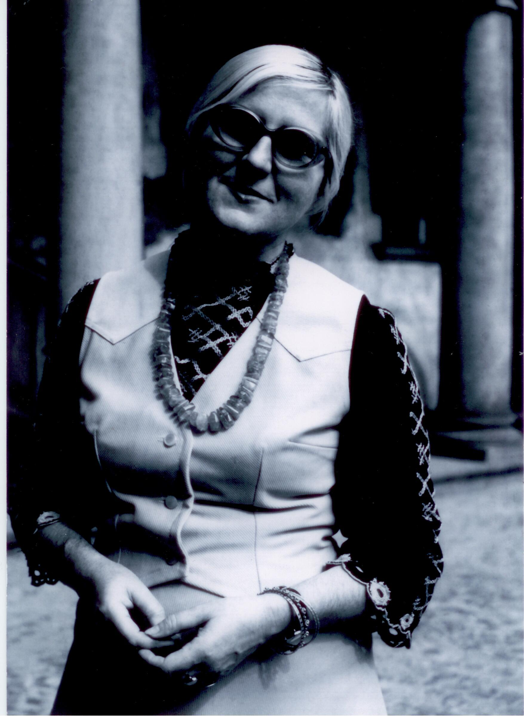 J. Werner, E.L. Pierzynska-Jelska, fotografia, 1979.